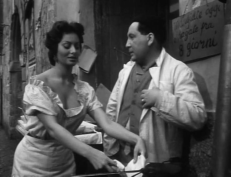 Sofia Loren prepara una pizza fritta nel film "L'oro di Napoli" di Vittorio De Sica (1954)